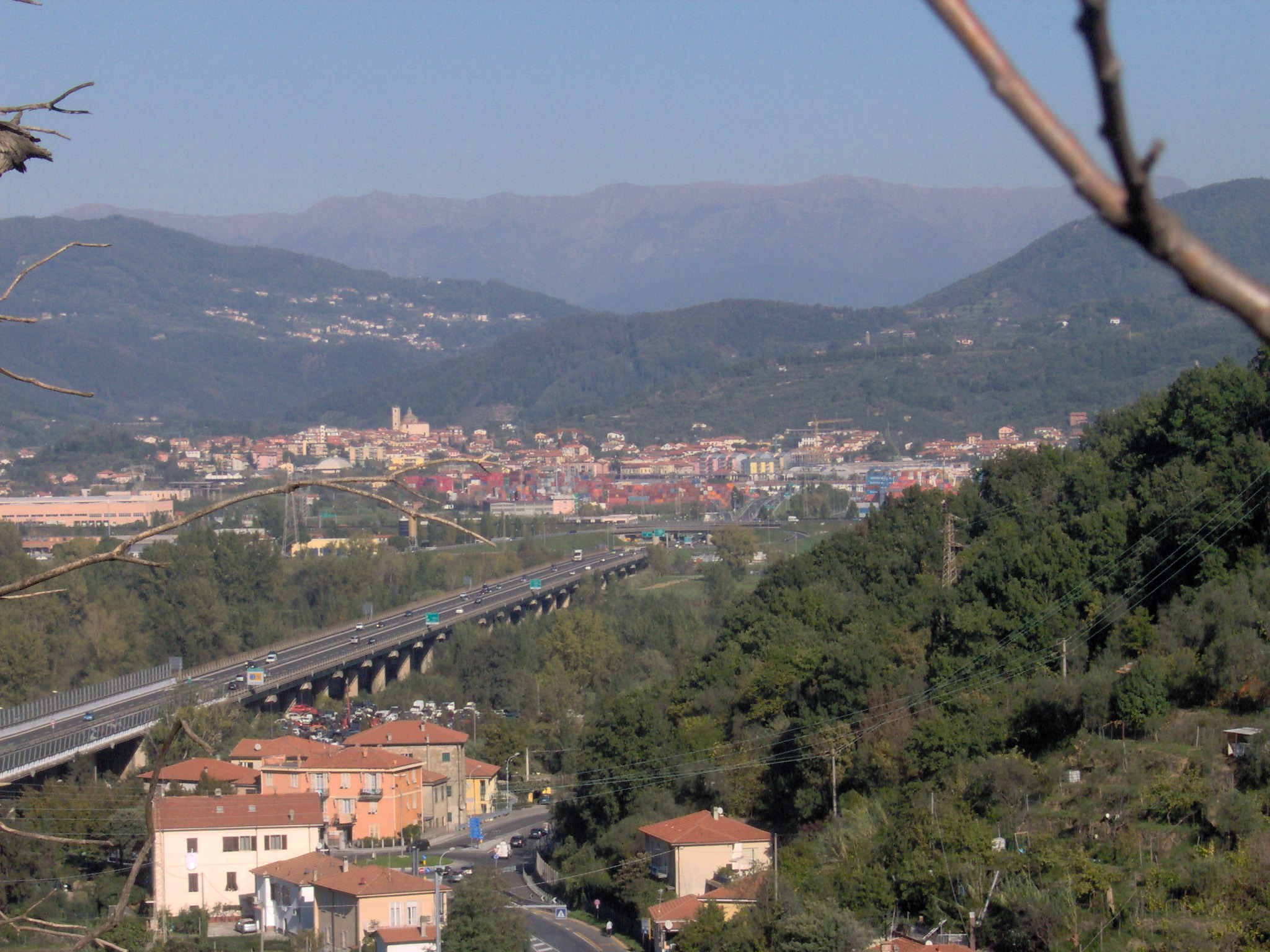 Santo Stefano di Magra, province of La Spezia, Italy